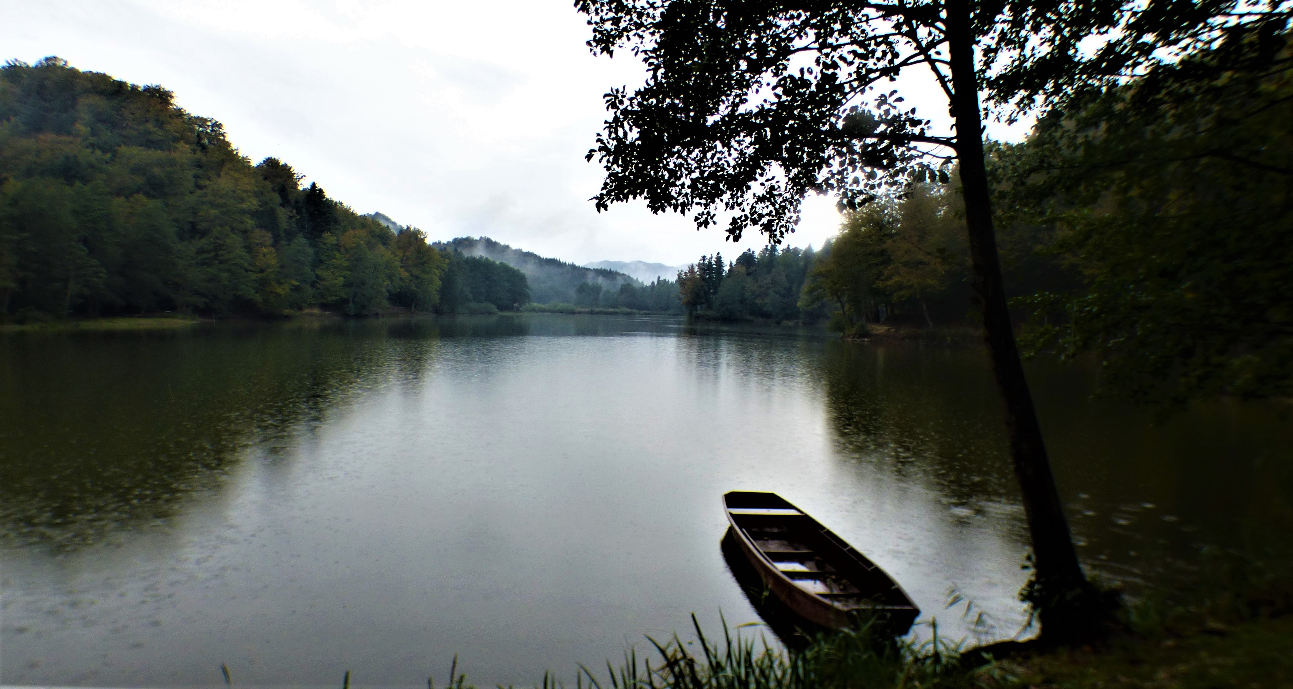 Čamac na jezeru